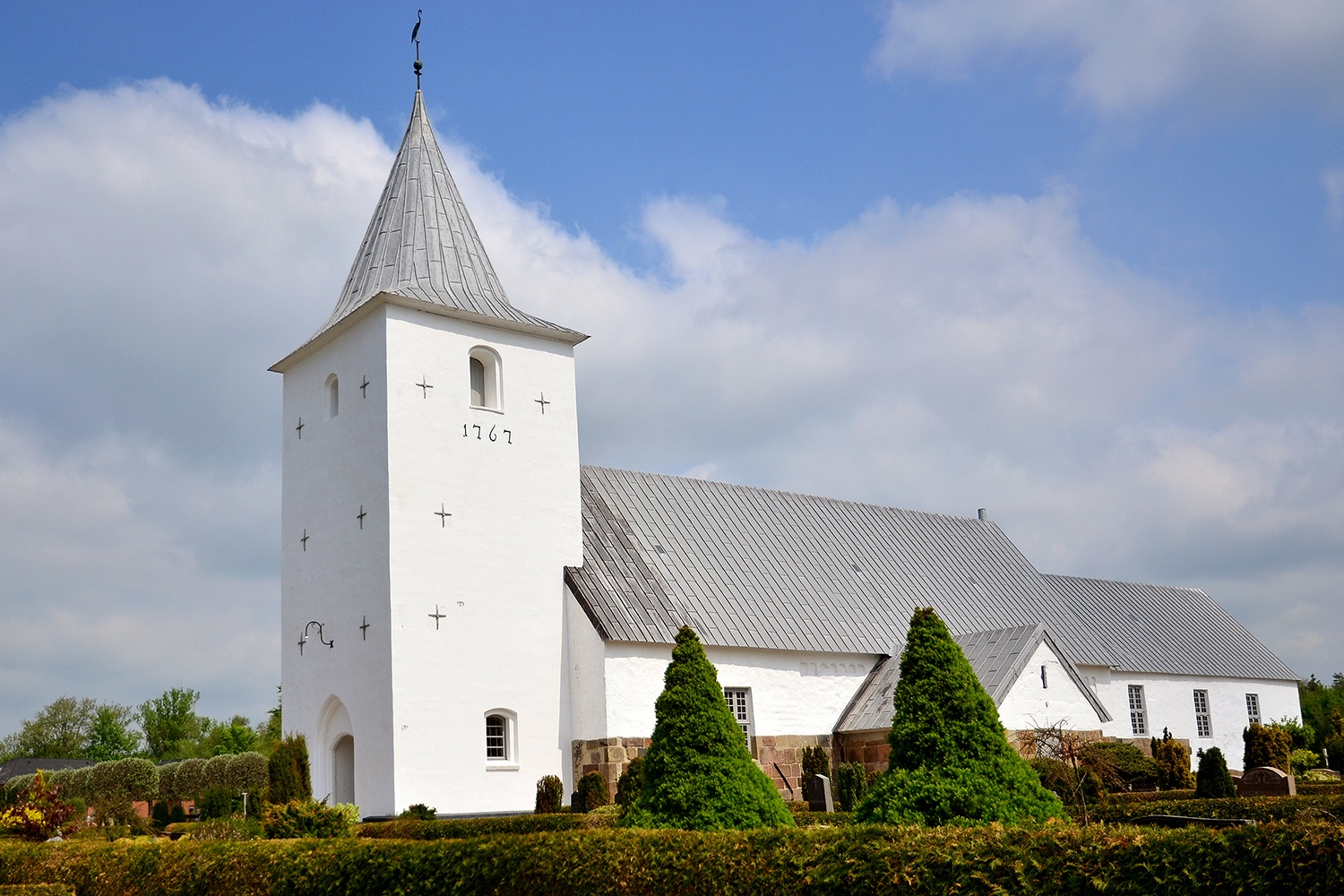 Oksböl, Dänemark, Datum/Uhrzeit: 19.05.2013 13:10:44